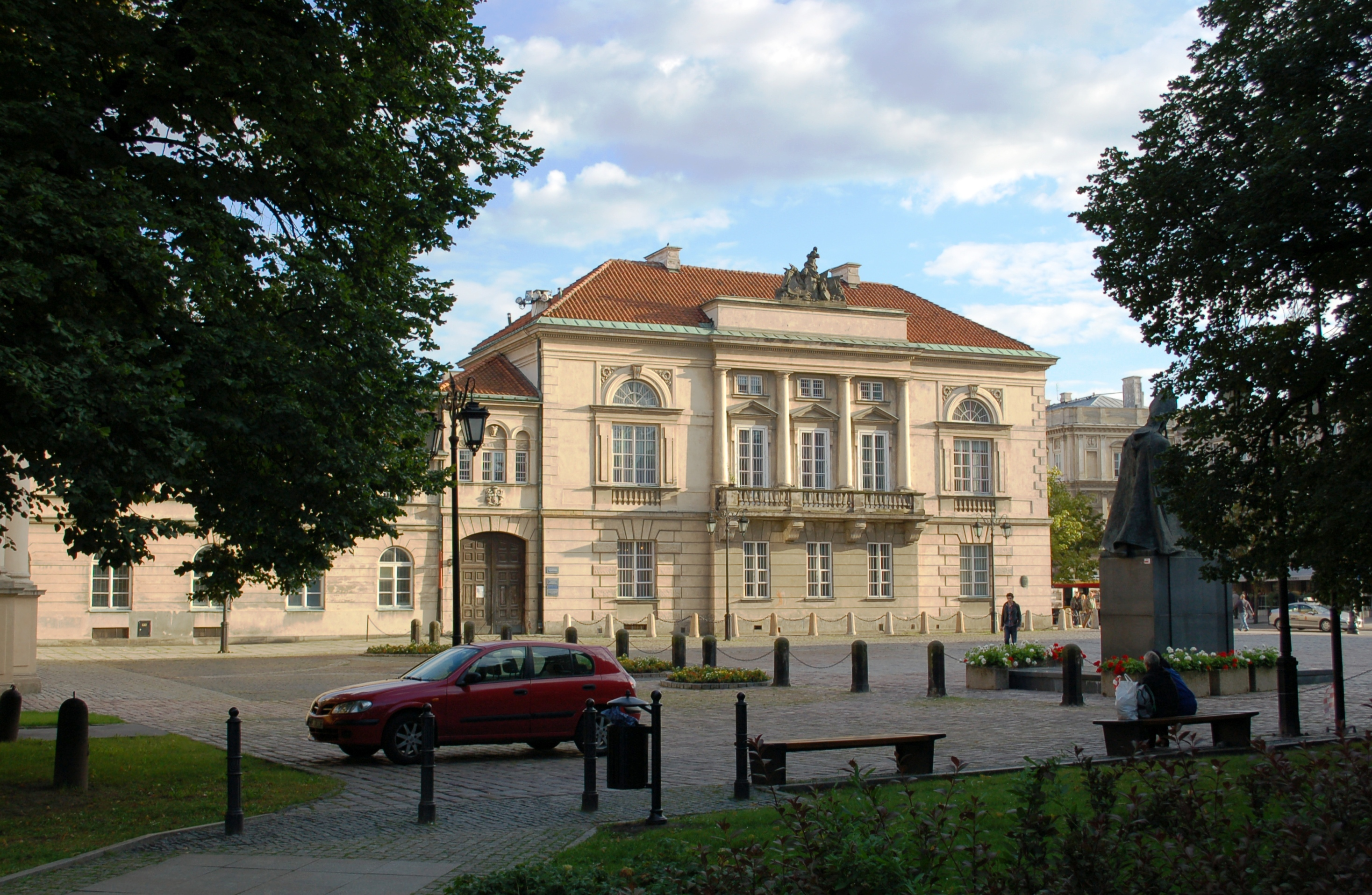 Warschau,Muzeum Uniwersytetu Warszawskiego, Tyszkiewiczów–Potockich-Palast